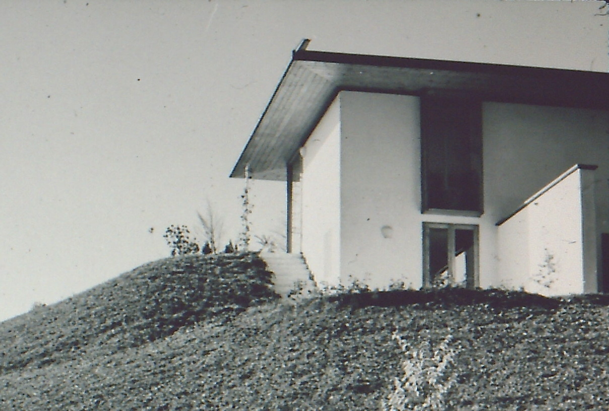 Landhaus von Ludwig Erhard am Tegernsee, Südostseite